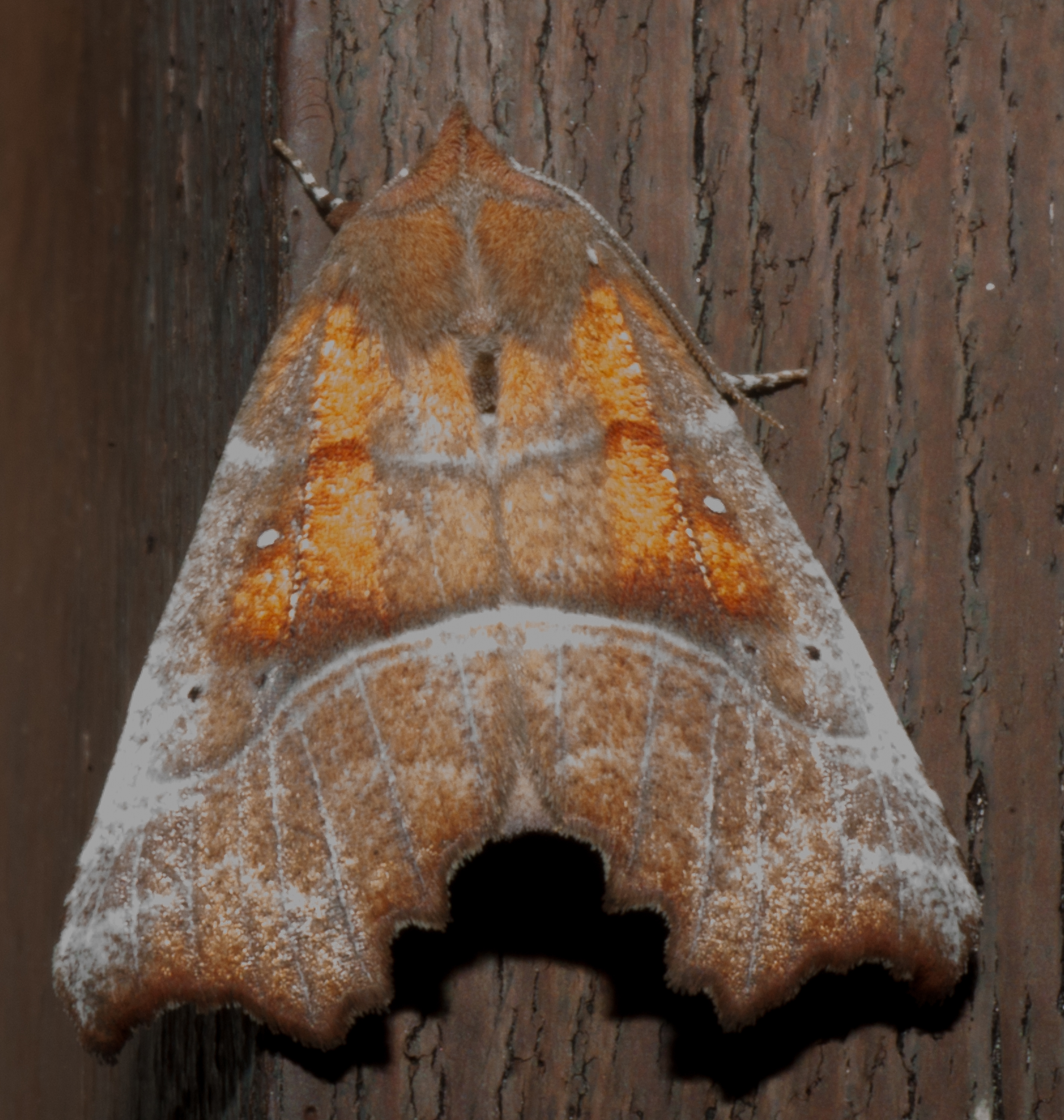 Scoliopteryx libatrix (Unterfamilie Scoliopteryginae; Familie Erebidae)